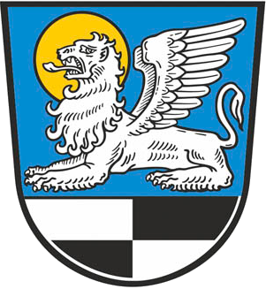 Grundlage des Gemeindewappens bildet ein Gerichtssiegel aus dem Jahr 1718, das den Evangelisten Markus mit seinem Attribut, dem Markuslöwen, zeigt als Hinweis auf die Pfarrkirche, die dem Heiligen geweiht ist. Der von Silber und Schwarz gevierte Schildfuß erinnert an die einstige Herrschaft der zollerischen Markgrafen von Brandenburg-Ansbach. Das Gemeindegebiet gehörte zum Oberschultheißenamt der Markgrafschaft Brandenburg-Ansbach.